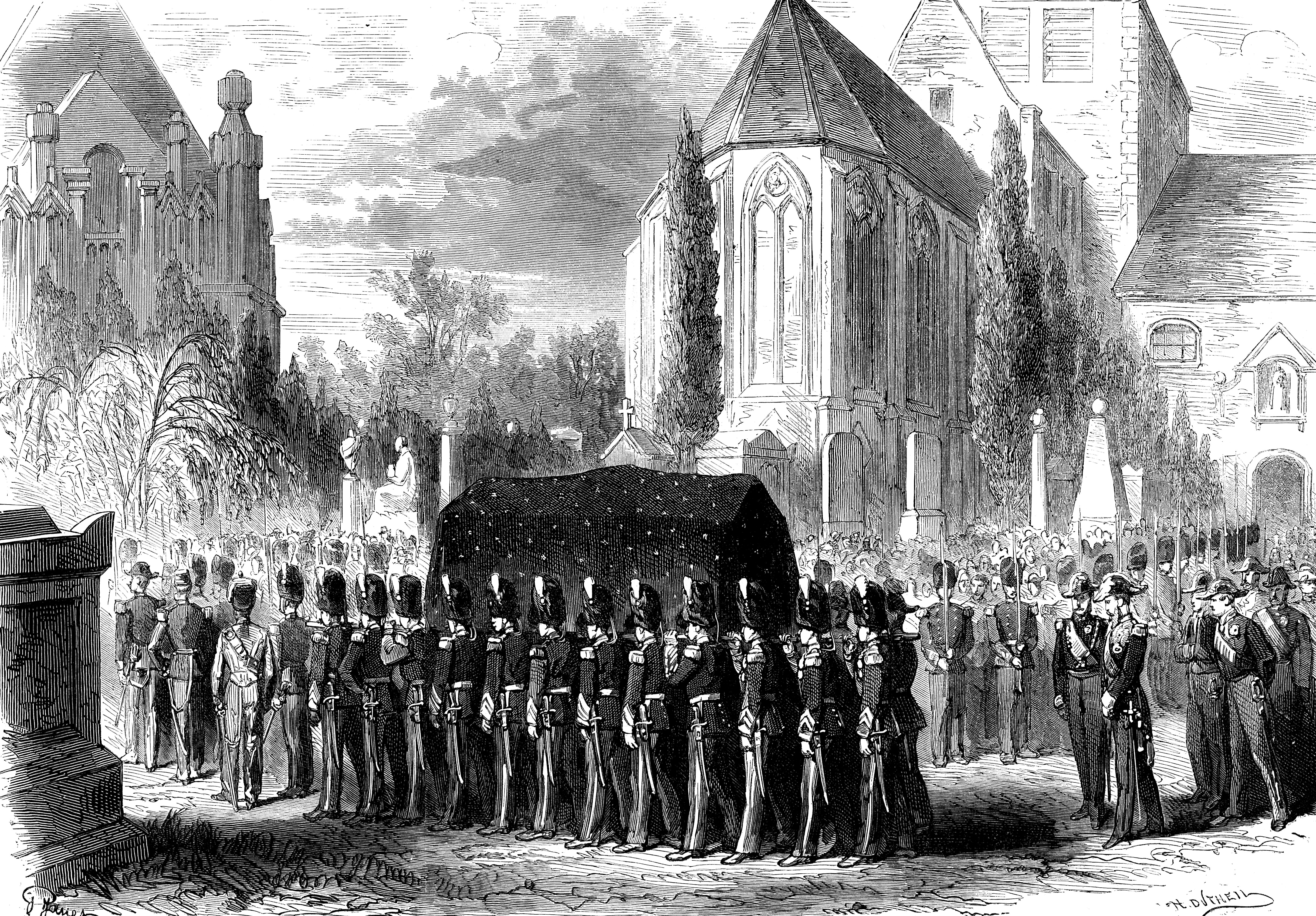 Translation des restes mortels du roi Léopold Ier de Belgique et de sa famille, Laeken, le 20 avril 1876. — En 1876, on décida de transférer les dépouilles du roi Léopold Ier, de la reine Louise, et celle du prince Léopold du caveau de l’ancienne église dans celui de la nouvelle. Cent Grenadiers ont porté sur des civières les cercueils dans le nouveau caveau. Le Roi, les ministres et un nombreux cortège les suivaient.